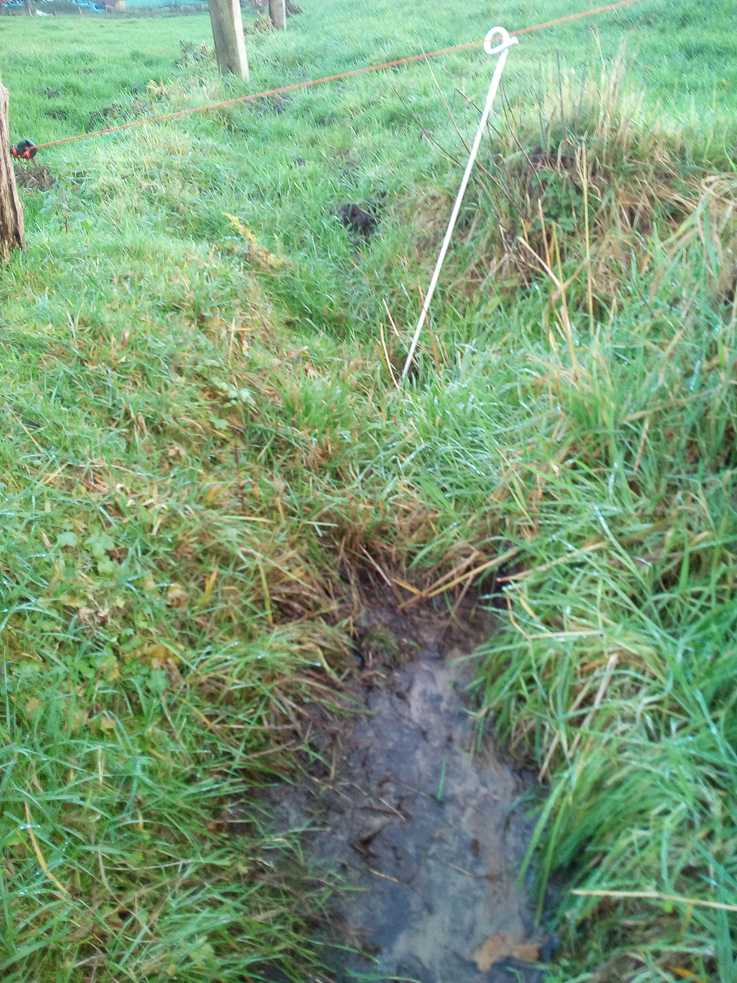 Quelle der Ahauser Aa nahe der "Bröcke"